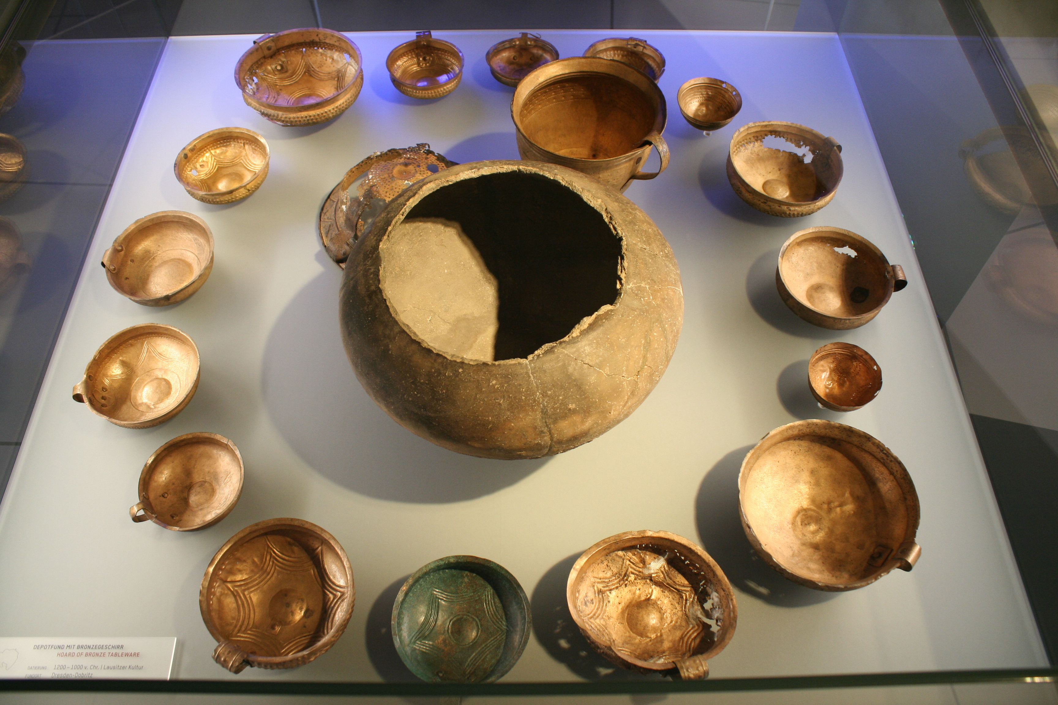 Depotfund mit Bronzegeschirr der Lausitzer Kultur aus Dresden-Dobritz, 1200-1000 v. Chr.; Staatliches Museum für Archäologie Chemnitz